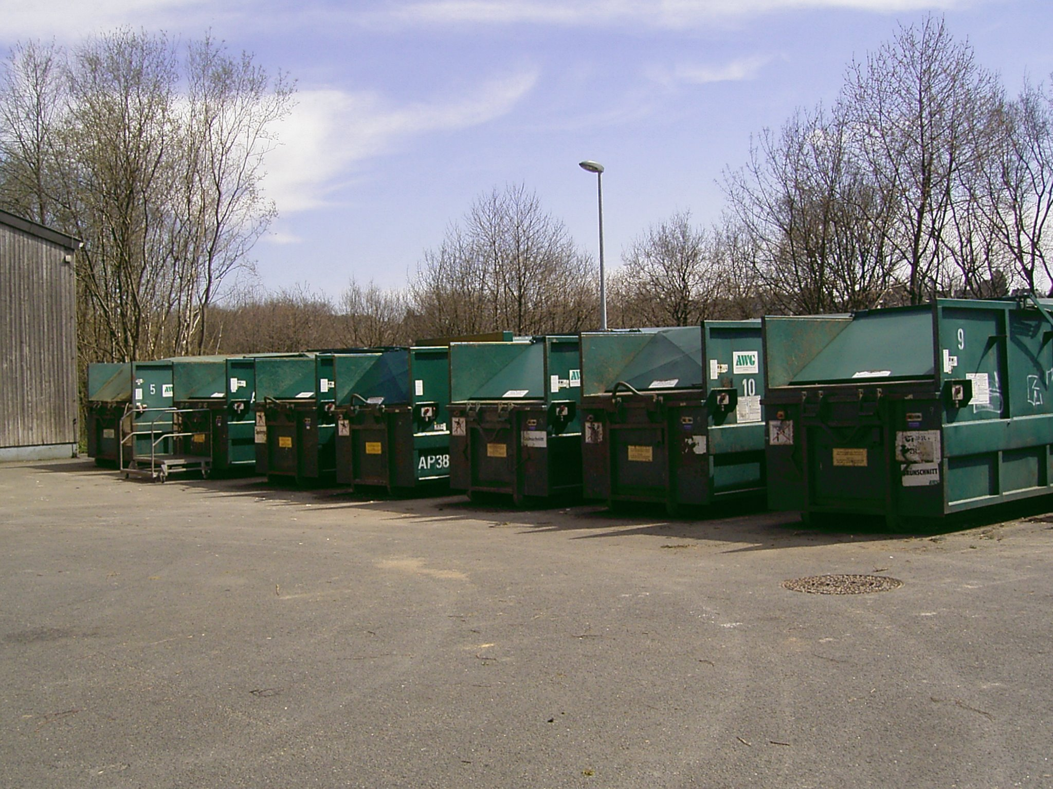 Recyclinghof Küllenhahn in Wuppertal